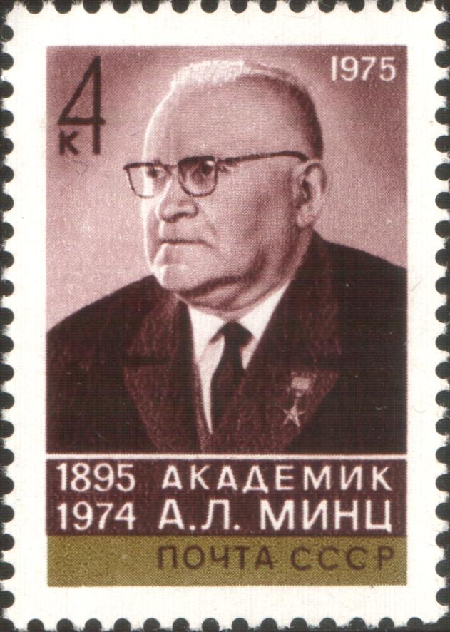 80-летие со дня рождения академика А. Л. Минца (1895-1974). Художник: А. Аксамит. Марка СССР 1975г., номинал - 4коп.